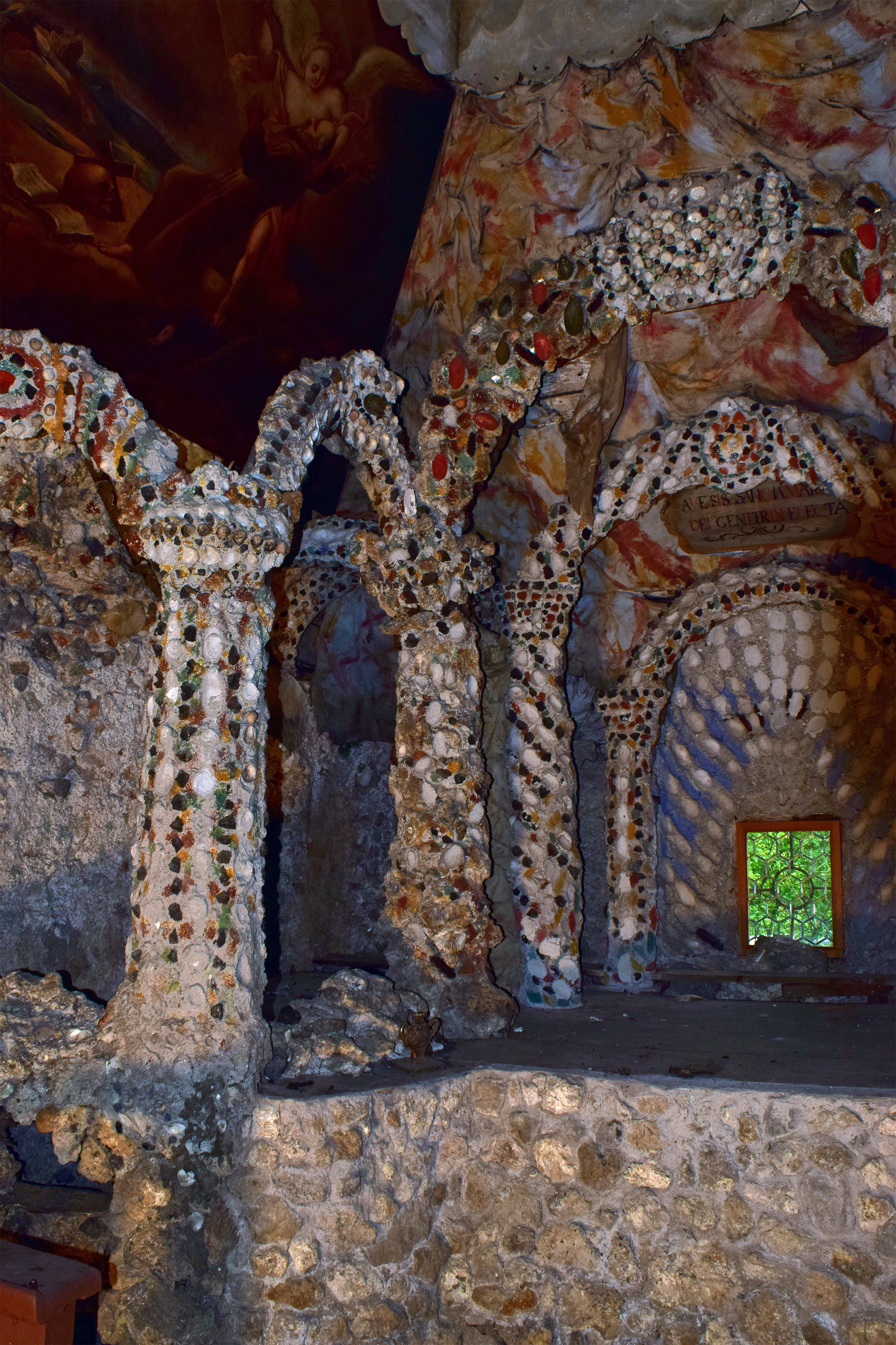 Kapuzinereremitage / Einsiedelei-Kapelle